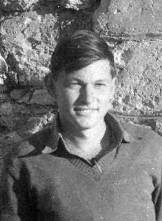 אברהם אדן (ברן) כמ"פ בחטיבת בנגב